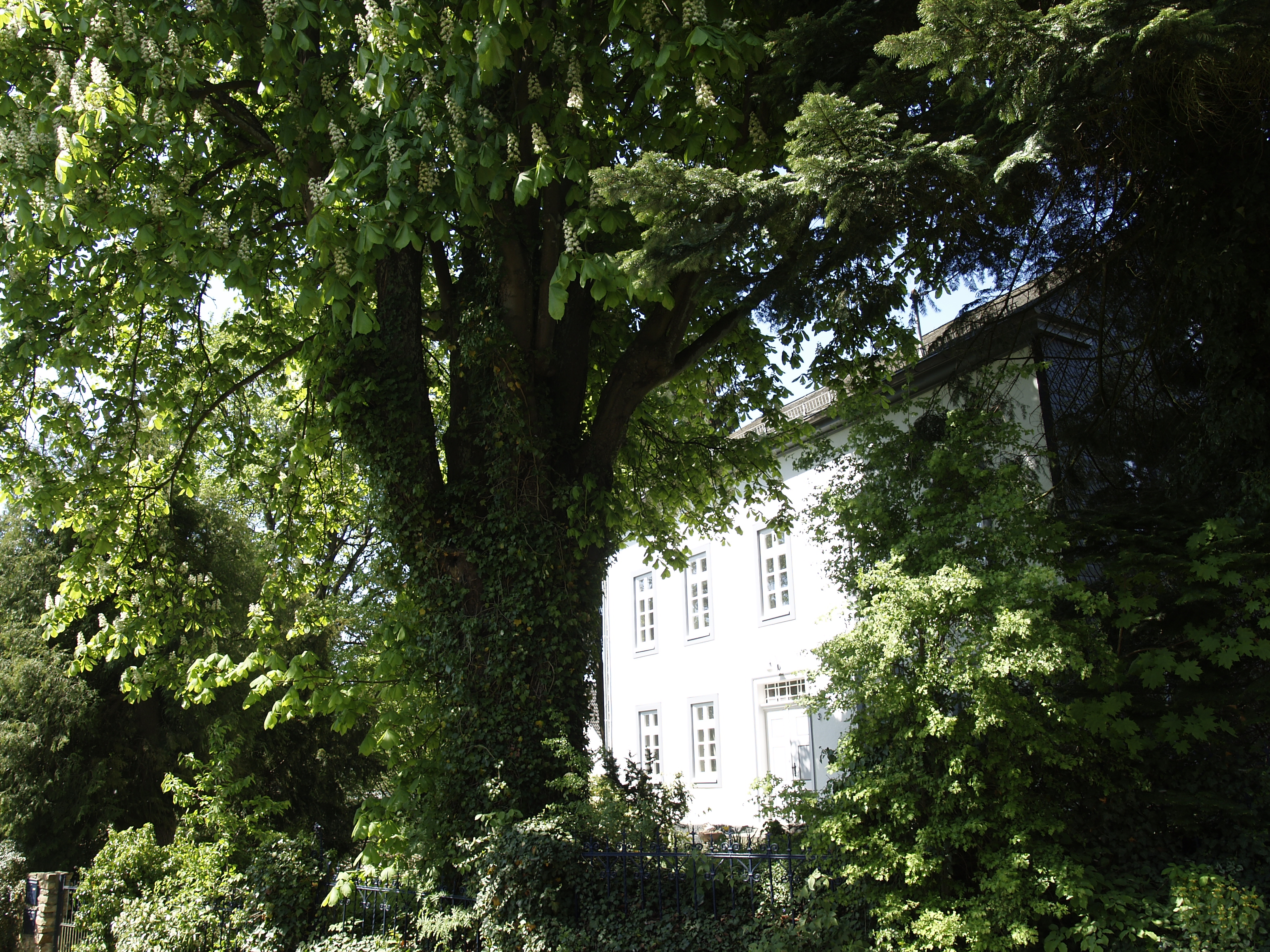 Das alte Pfarrhaus in der Nähe der Oberdreiser Kirche. Hier wurde der Sanskrit-Forscher Paul Deussen geboren.